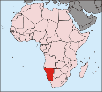 Karte von Afrika, Namibia hervorgehoben